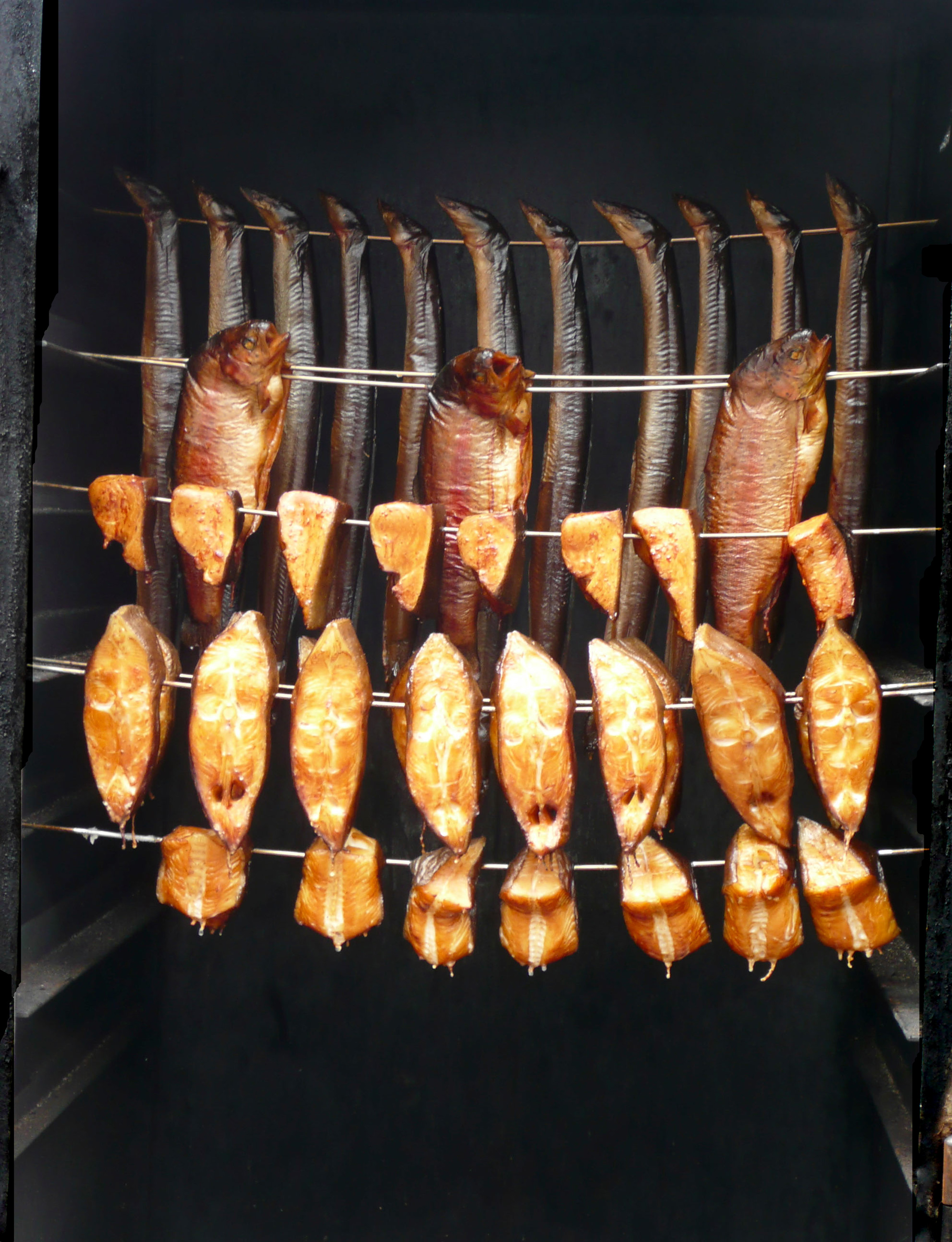 Smoked fish in smoker